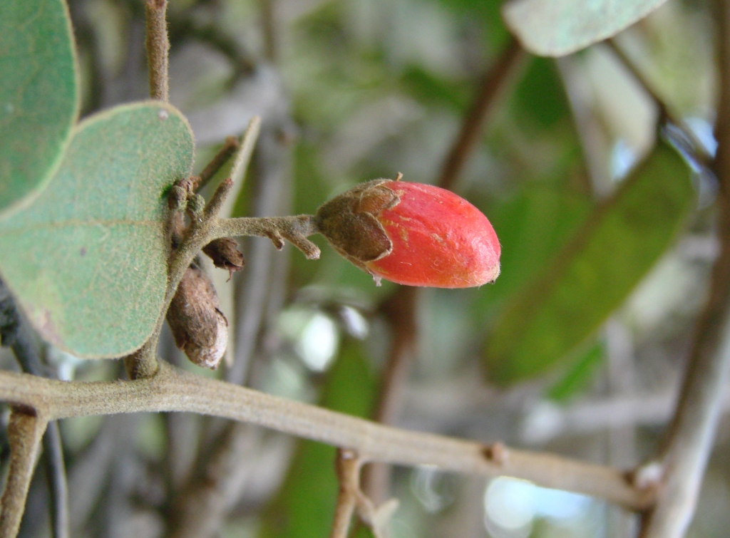 Flower of Rourea induta - CONNARACEAE Jardim Botânico de Brasília - Distrito Federal - Brasil.